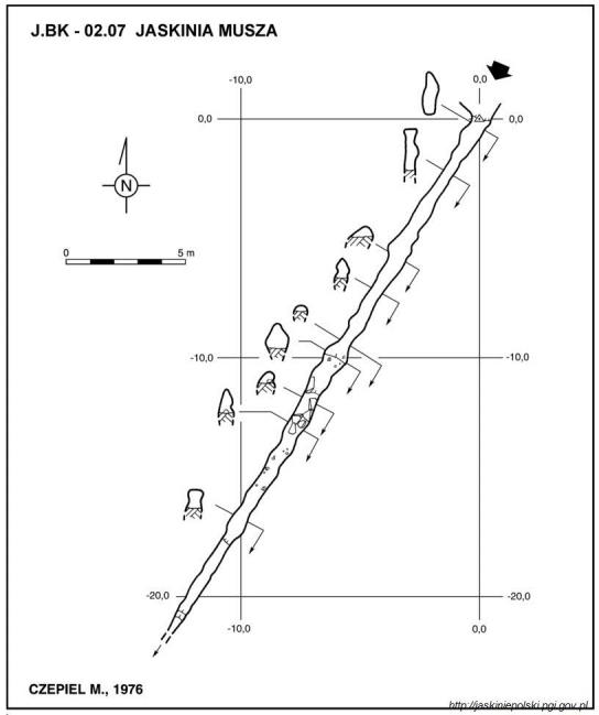 Jaskinia Musza - plan